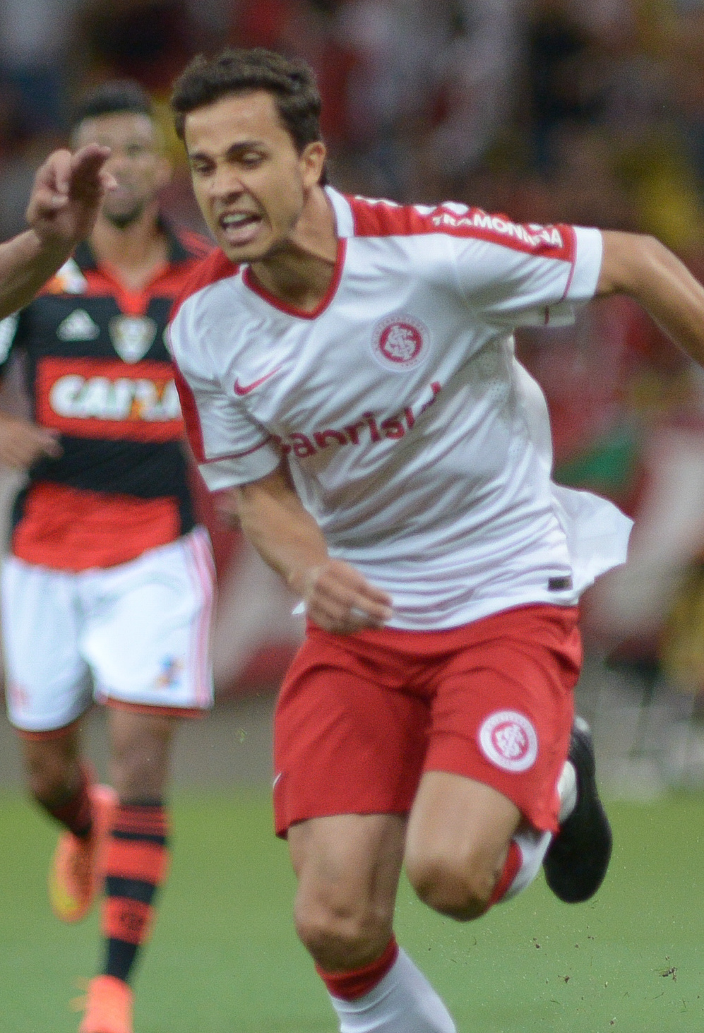 RIO DE JANEIRO, RJ - 22/10/2014: FLAMENGO X INTERNACIONAL - Chicão e Alex dividem a bola, primeiro tempo. Flamengo x Internacional realizada no Estádio do Maracanã, válida pela 30a rodada do Campeonato Brasileiro . (Foto: Armando Paiva / Fotoarena)